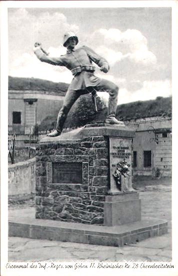 Das Regimentskriegerdenkmal 1914-18 des Infanterie-Regiments No. 28